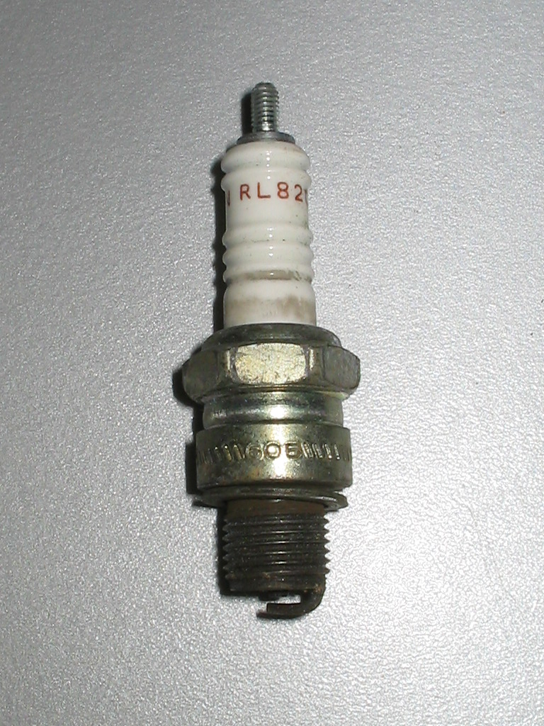 spark plug /bougie